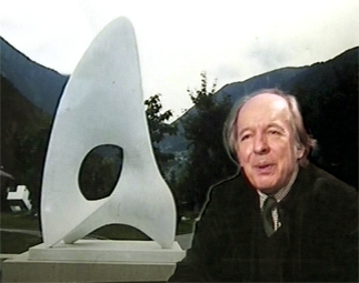 Portrait de Antoine Poncet